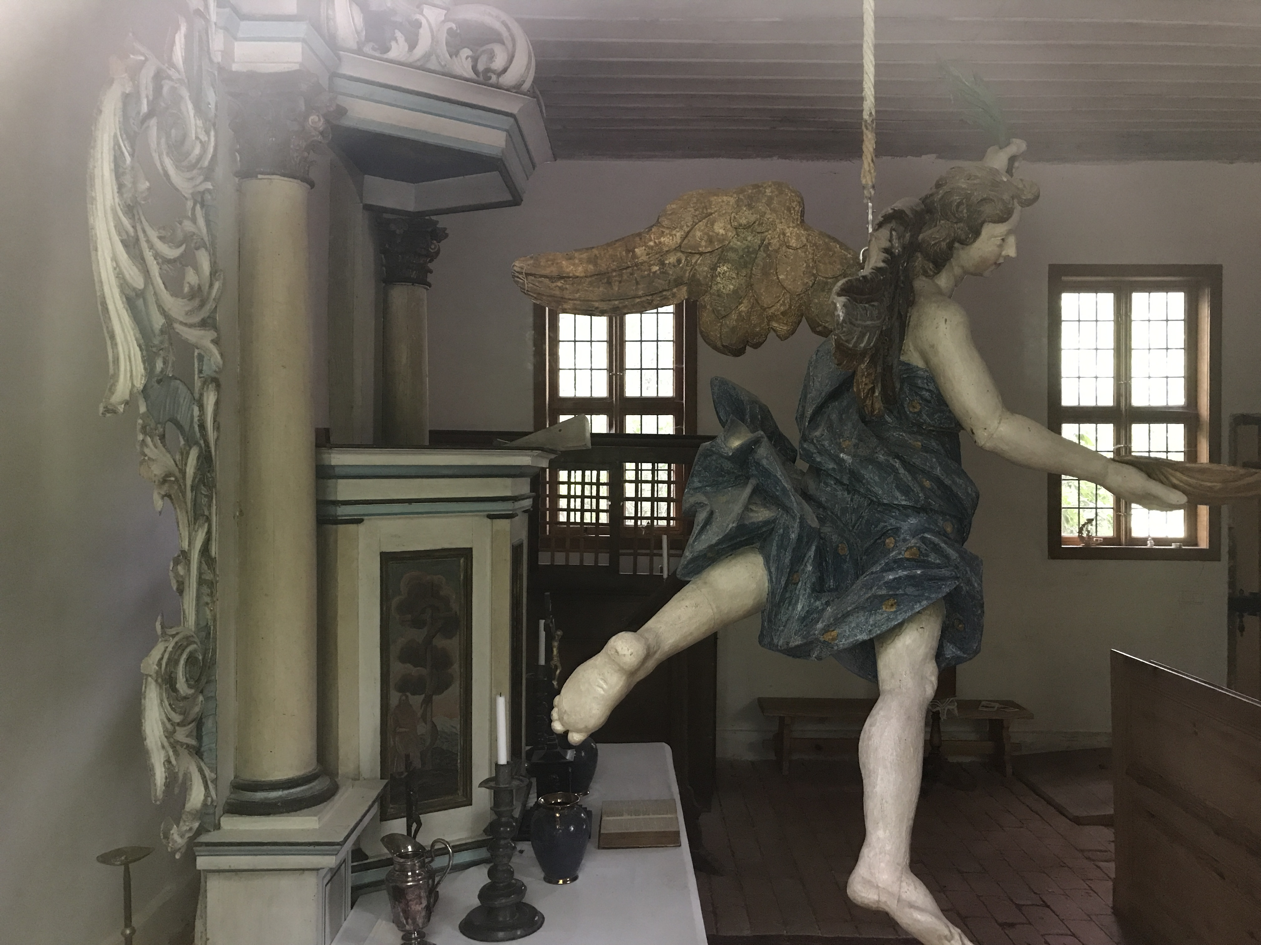 Die Dorfkirche Dahlen ist eine Fachwerkkirche aus der zweiten Hälfte des 17. Jahrhunderts in Dahlen, einem Ortsteil der Gemeinde Gräben im Landkreis Potsdam-Mittelmark. Im Innern hängt unter anderem ein Taufengel.